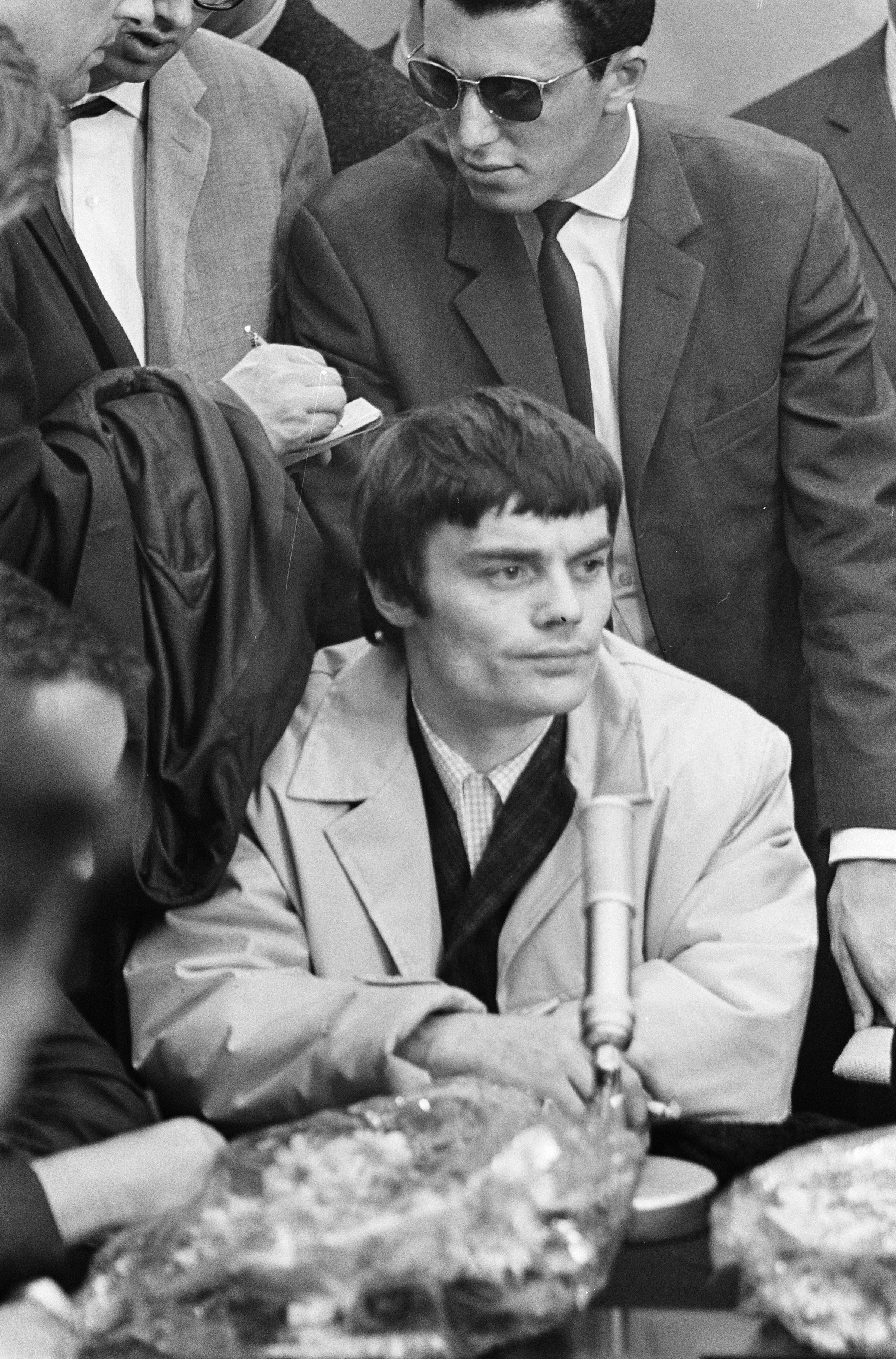 Collectie / Archief : Fotocollectie Anefo Reportage / Serie : [ onbekend ] Beschrijving : Aankomst Beatles op Schiphol, de Beatles tijdens persconferentie. Jimmy Nicol, vervanger van Ringo Starr Datum : 5 juni 1964 Locatie : Noord-Holland, Schiphol Trefwoorden : muzikanten, popgroepen, publiek, vliegvelden Persoonsnaam : Jimmy Nicol Instellingsnaam : Beatles Fotograaf : Pot, Harry / Anefo Auteursrechthebbende : Nationaal Archief Materiaalsoort : Negatief (zwart/wit) Nummer archiefinventaris : bekijk toegang 2.24.01.05 Bestanddeelnummer : 916-5129